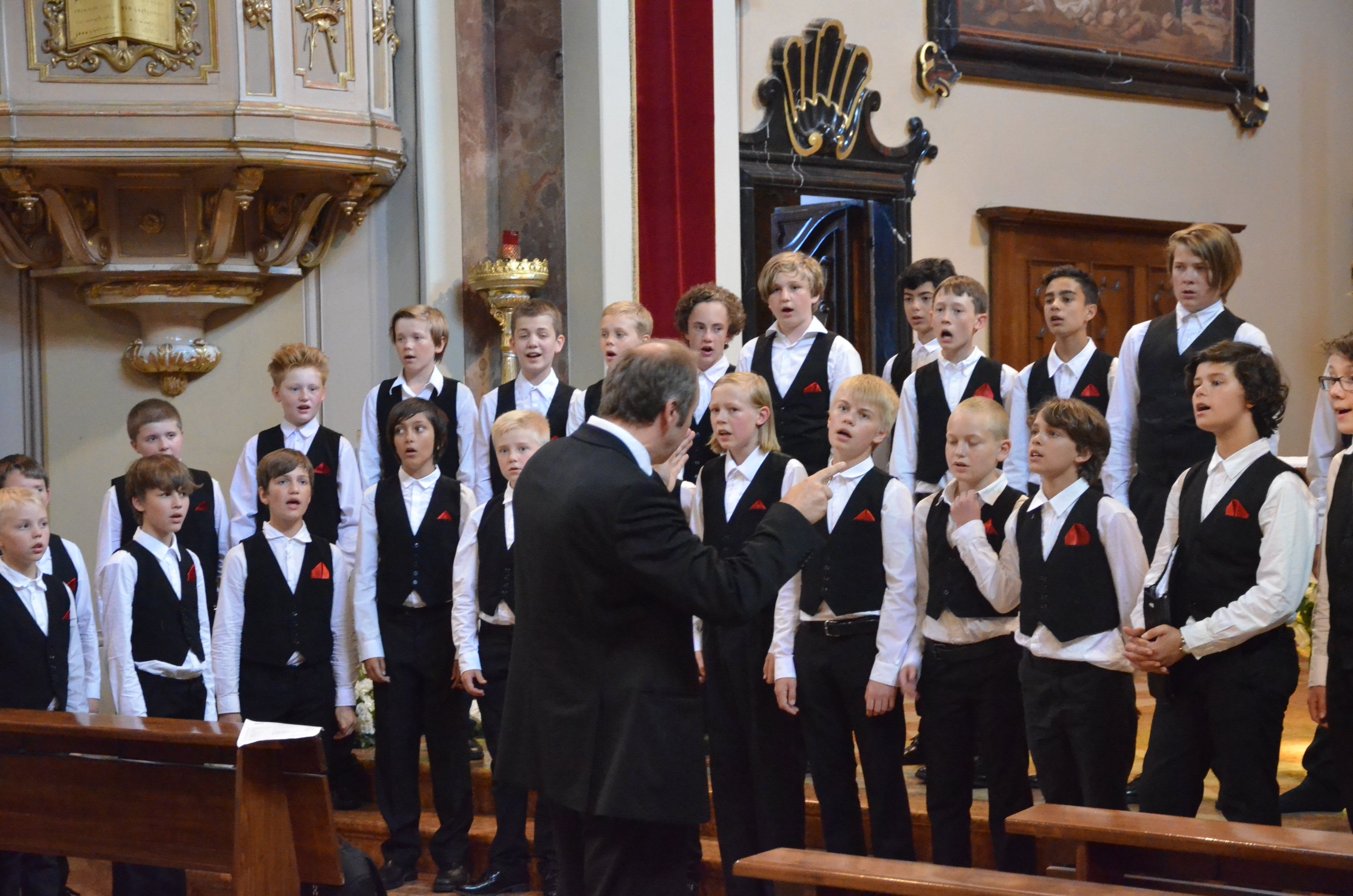 Fetsival i Lecco, Adolf Fredriks gosskör